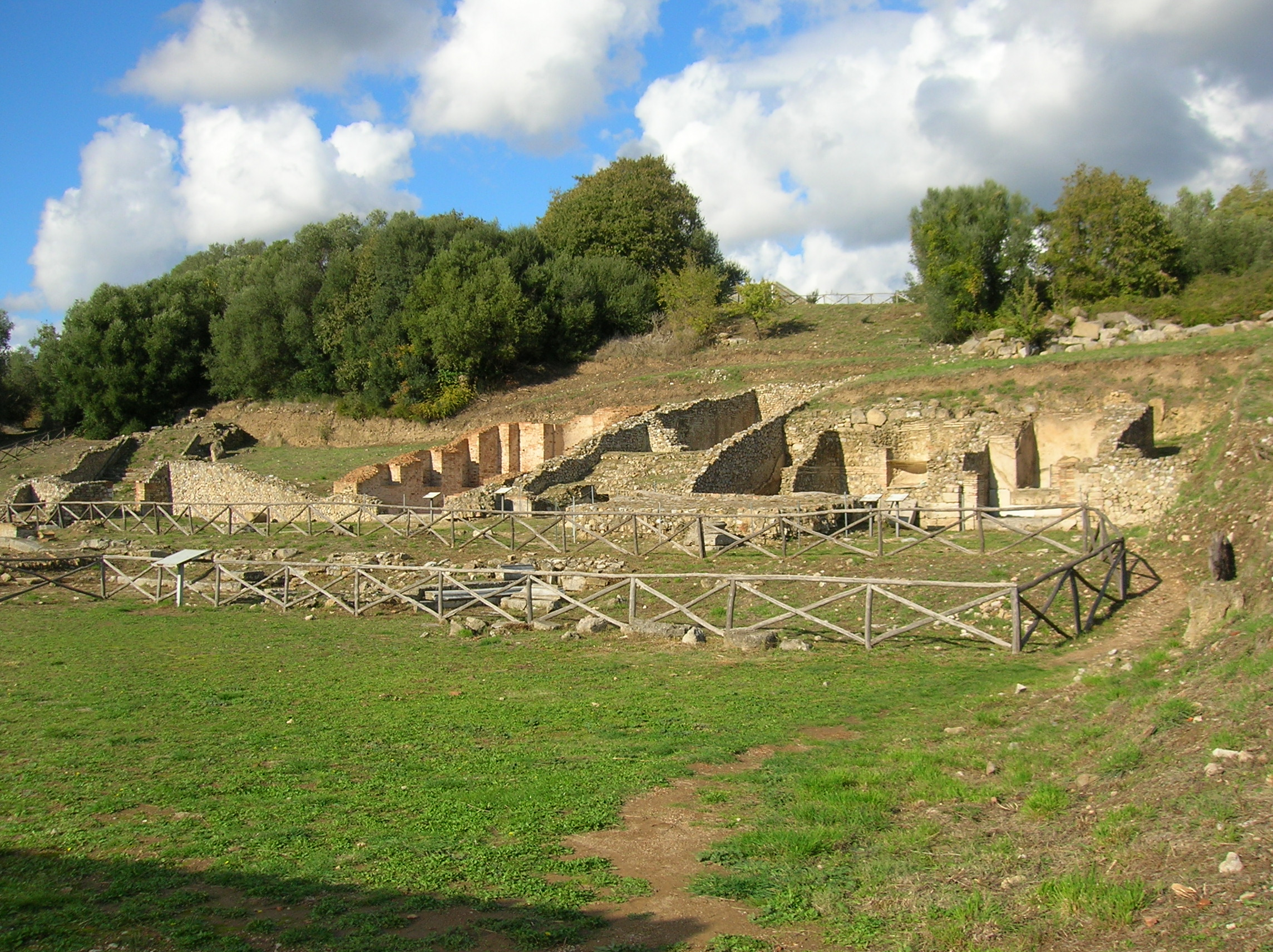 Area archeologica di Roselle, Toscana, Italia